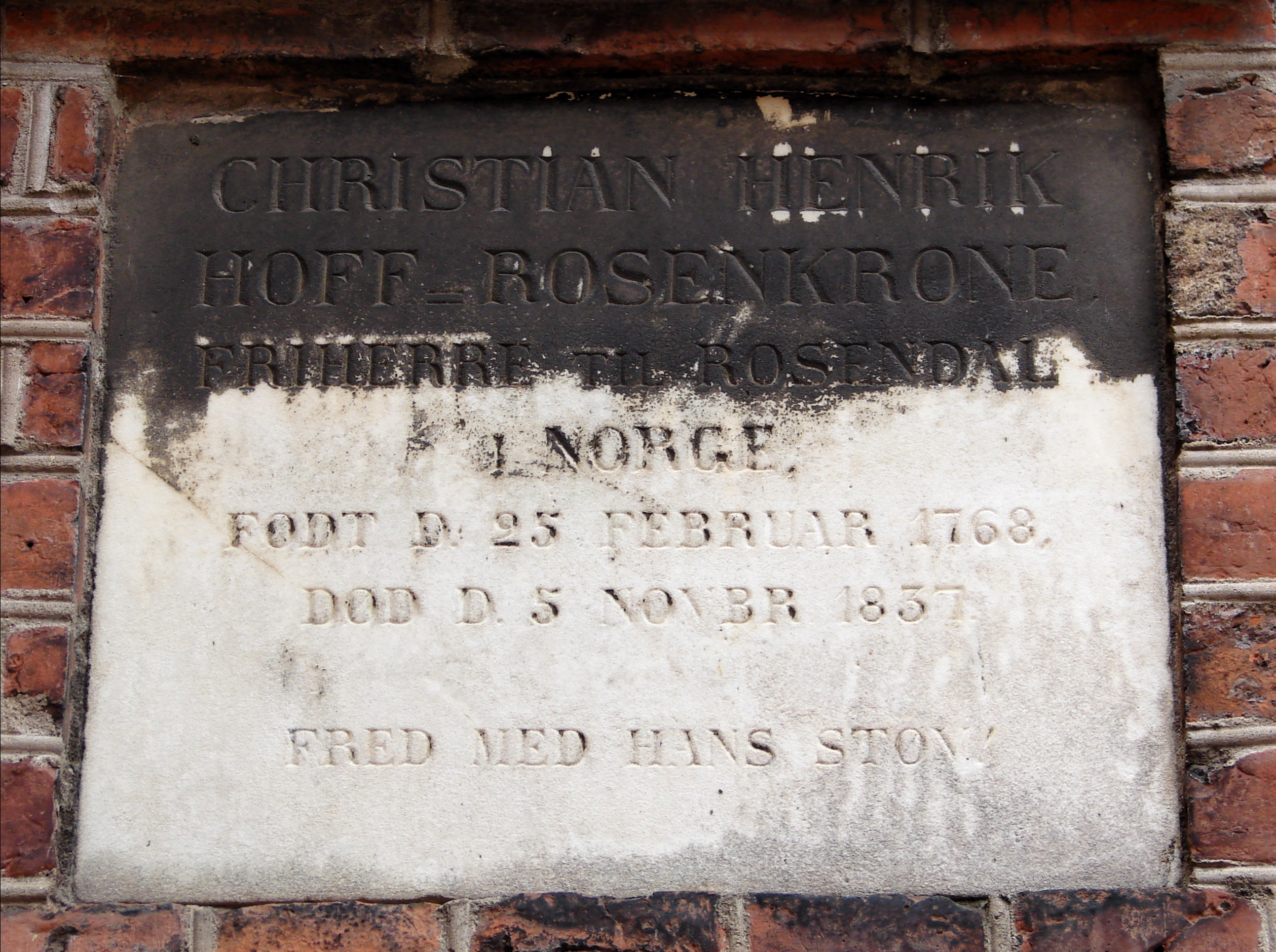 CHRISTIAN HENRIK HOFF-ROSENKRONE FRIHERRE TIL ROSENDAL I NORGE. FØDT D. 25. FEBRUAR 1768. DØD D. 5. NOVBR. 1837. FRED MED HANS STØV. Holmens Kirke, København